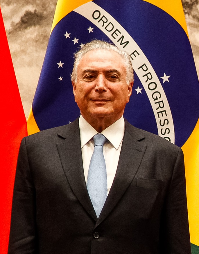 (Pequim - China 01/09/2017), Cerimônia de assinatura de atos.